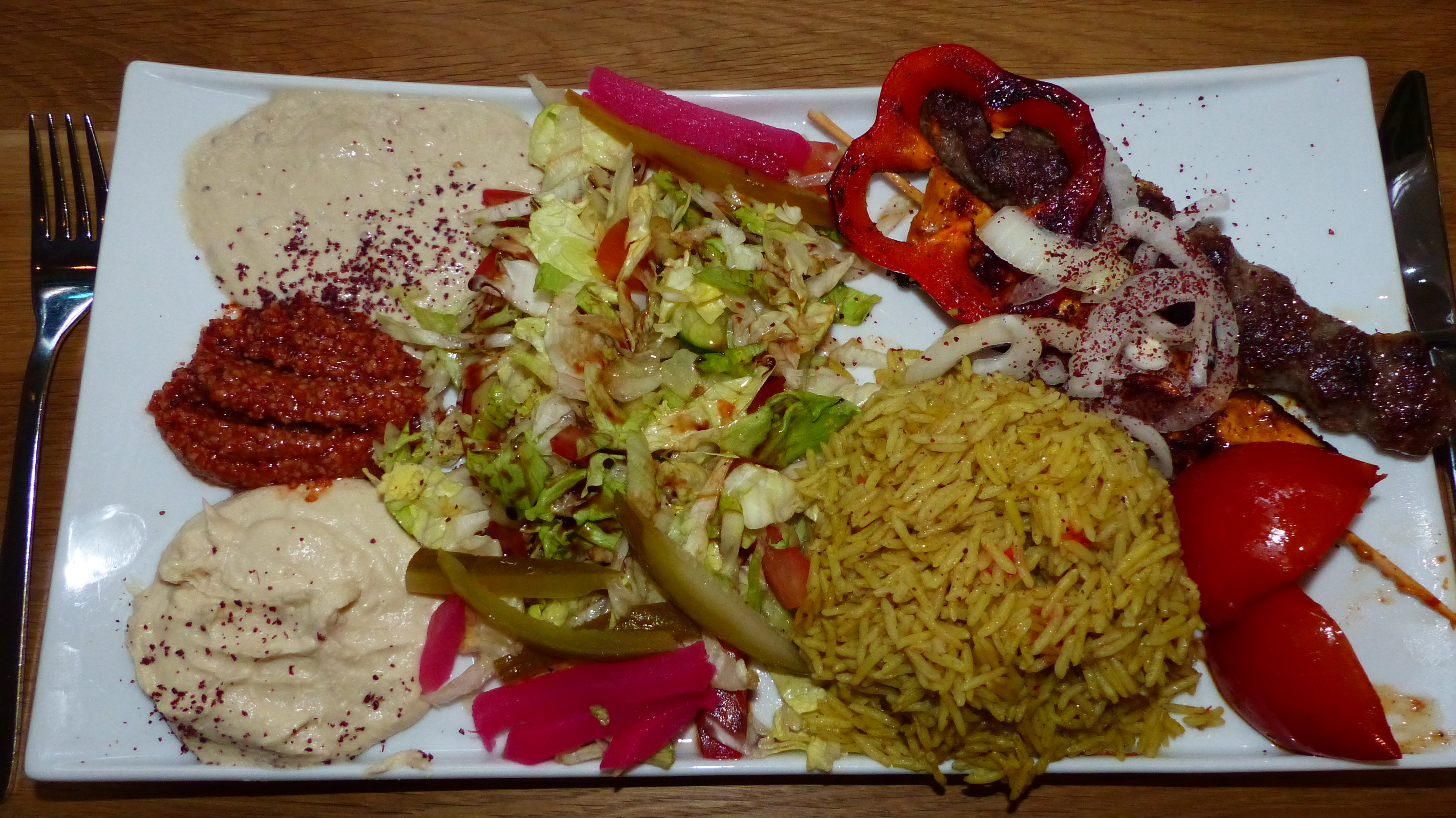 Rindfleisch- und Hühnerspiess arabisch mit Reis, am Arabischen Stand im Restaurant "Cafe Markthalle Prag" in Dresden